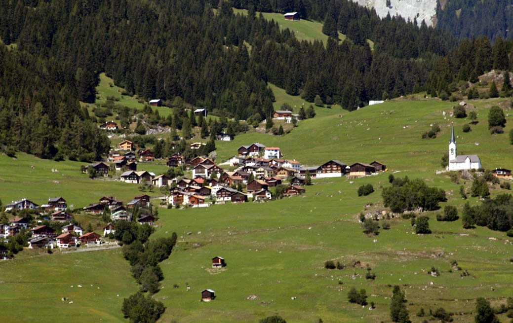 Ladir